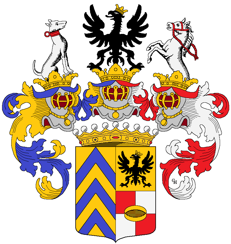 Wappen des kaiserlichen General-Adjutanten in Mailand, Giovanni Stefano von Meraviglia-Crivelli († 1779), verliehen anlässlich seiner Erhebung in den erbländisch-österreichischen Grafenstand 1761. Zeichnung von Gerd Hruška ( Für weitere Informationen zu dieser Standeserhebung siehe (